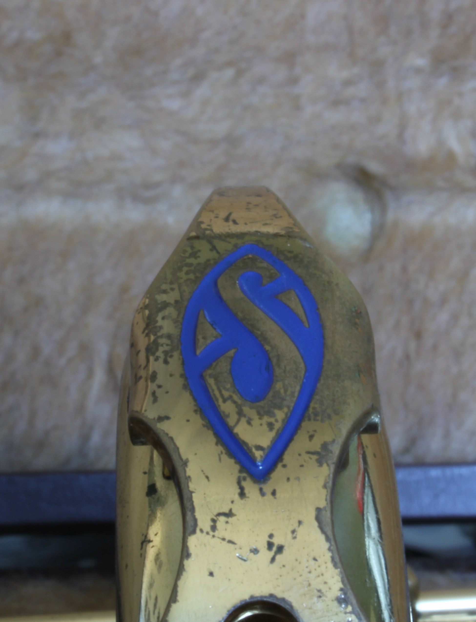 Le S se trouvant sur le bocal des saxophones selmer du Mark VI jusqu'en 2010